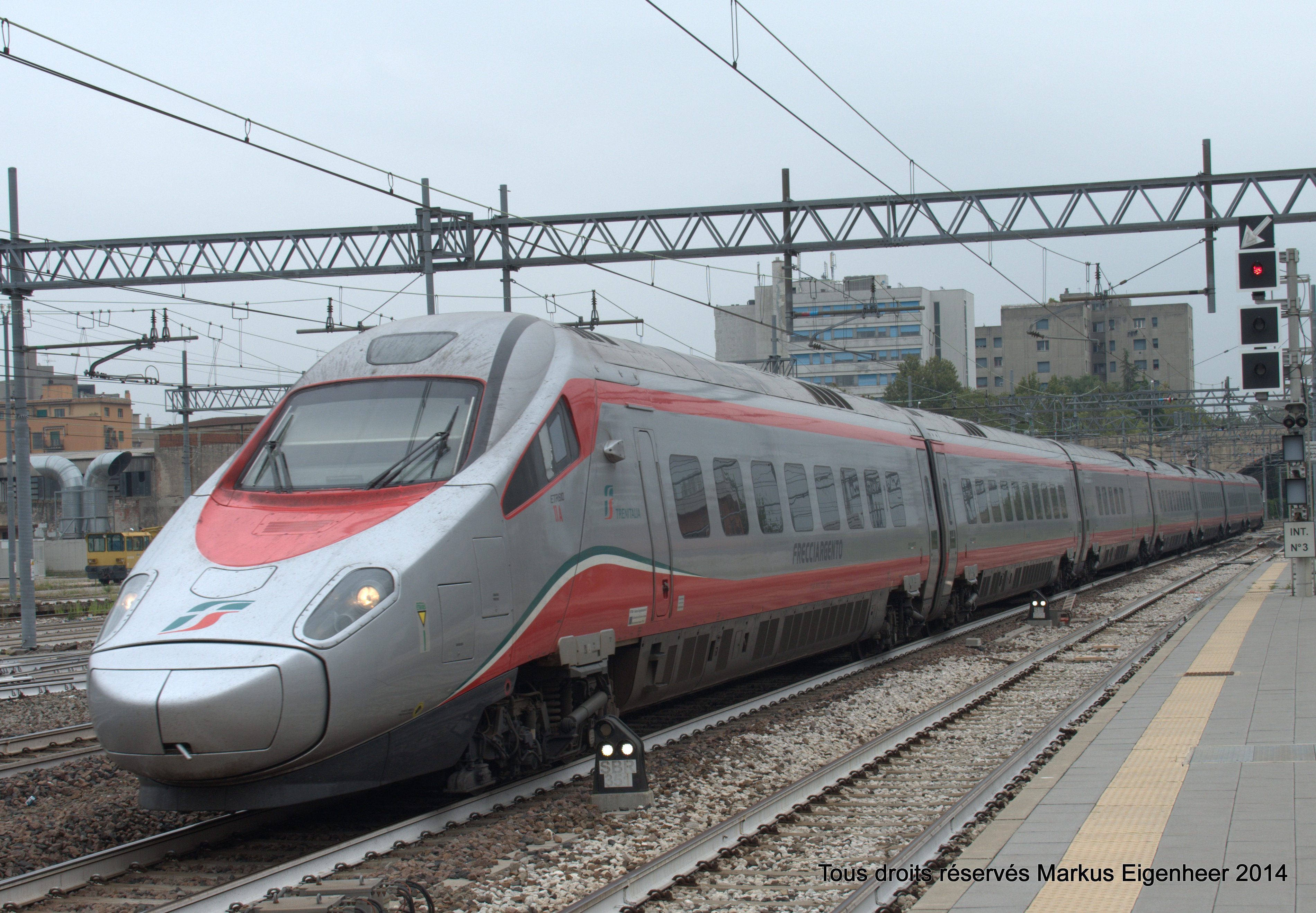 Bologna 04.09.14